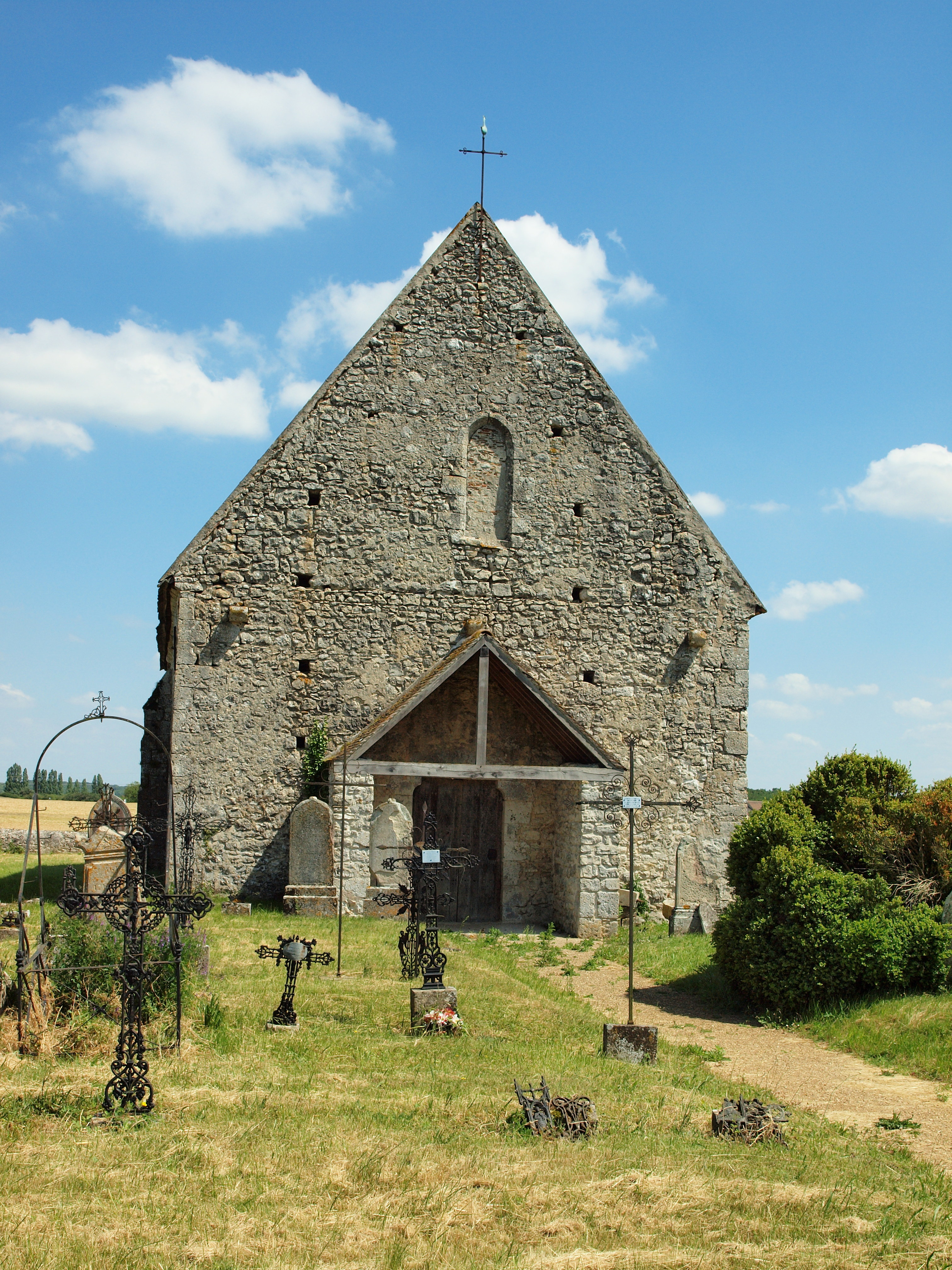 Église Saint-Eutrope de Lagerville (commune de Chaintreaux, Seine & Marne, France)